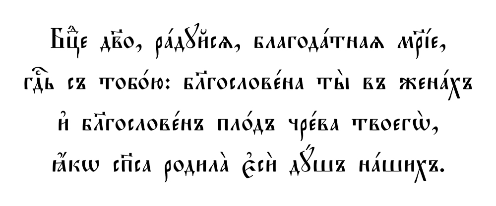 Russian traditional Prayer: Bogoroditse Devo Raduisia In Church Slavonic. Бцⷣе дв҃о, ра́дꙋйсѧ, благода́тнаѧ м︮р︯і́е, гдⷭ҇ь съ тобо́ю: б︮л︯гослове́на ты въ жена́хъ, и҆ б︮л︯гословенъ пло́дъ чре́ва твоегѡ̀, ꙗ҆́ко с︮п︯са роднла̀ є҆сн̀ дꙋ́шъ на́шнхъ.